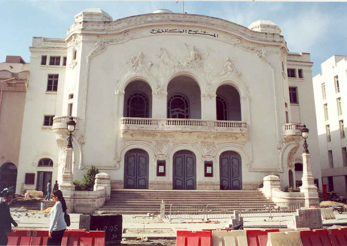 Le Théâtre municipal de Tunis en cours de rénovation pour son centenaire (2001) Bertrand Bouret